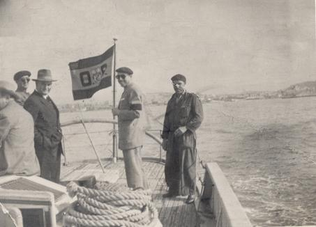 Rumbo a Tabarca desde el puerto de Alicante a bordo del remolcador "Prospero Lafarga" se dirige el alcalde a visitar las obras del puerto de pescadores de la isla.